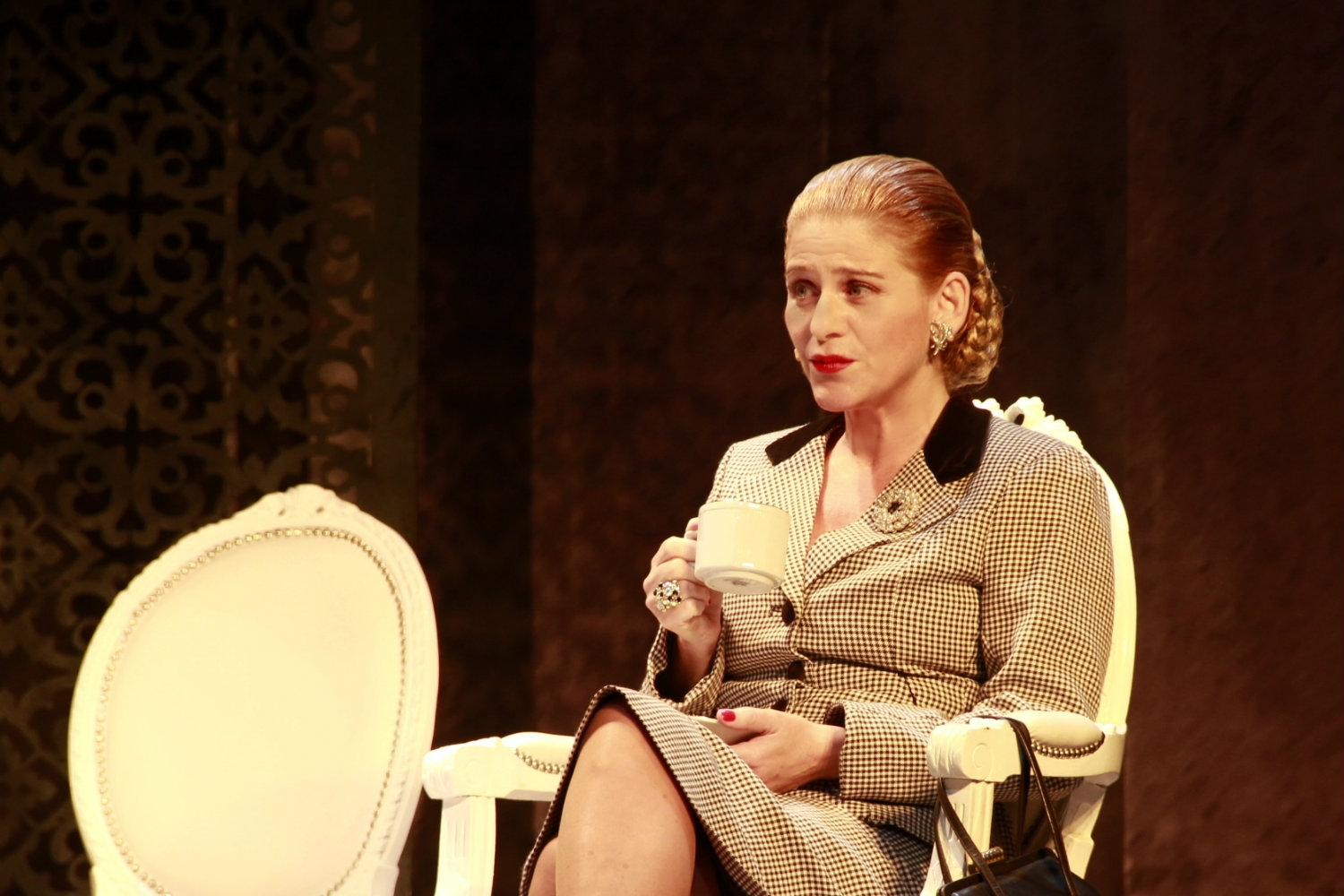 La actriz Emilia Mazer (en la fotografía) representa a Eva Perón junto a la actriz Norma Pons (1943-2014), que representa a Victoria Ocampo, en la gira nacional 2013 de la obra de teatro Eva y Victoria.